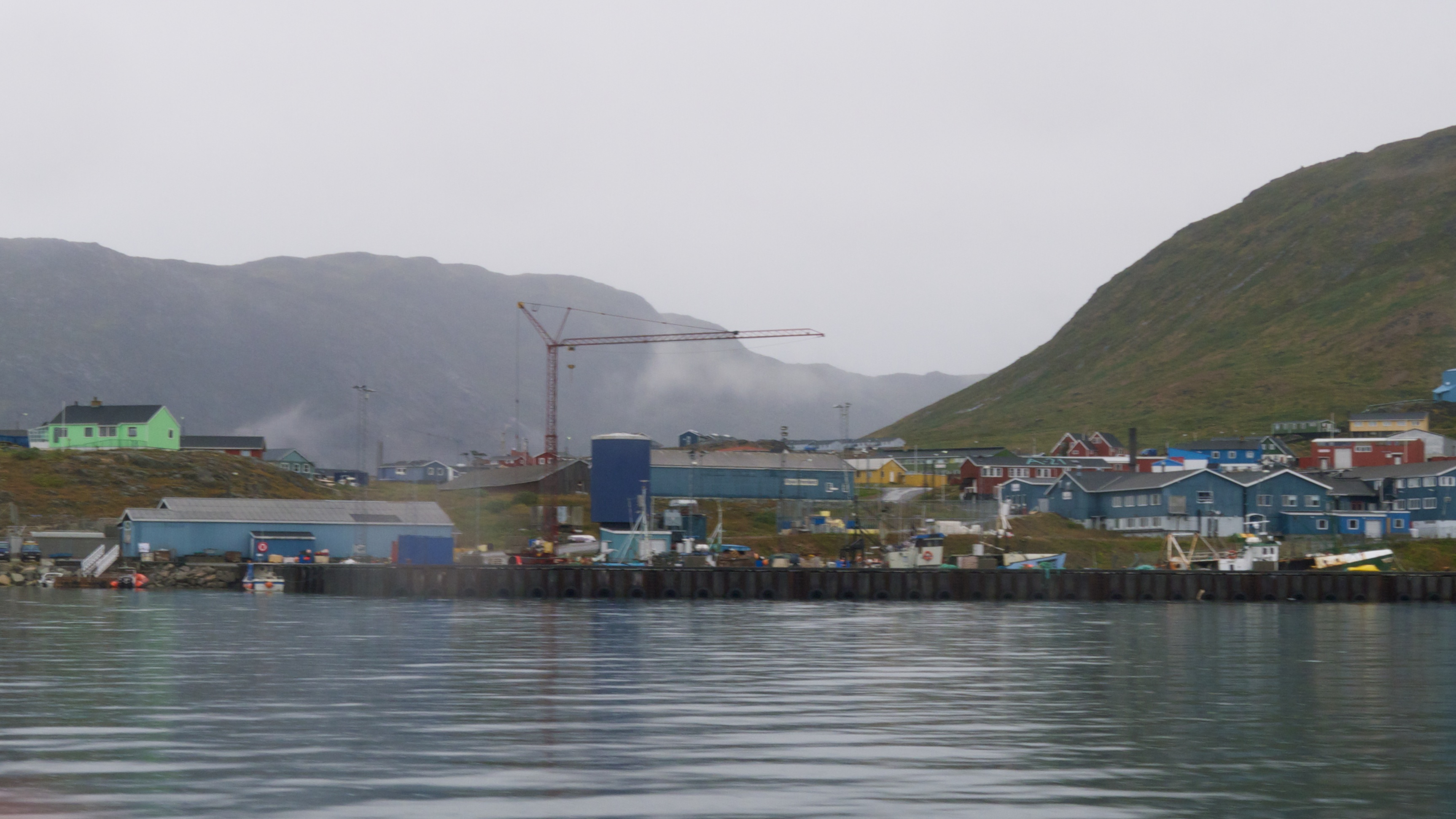 נארסאק